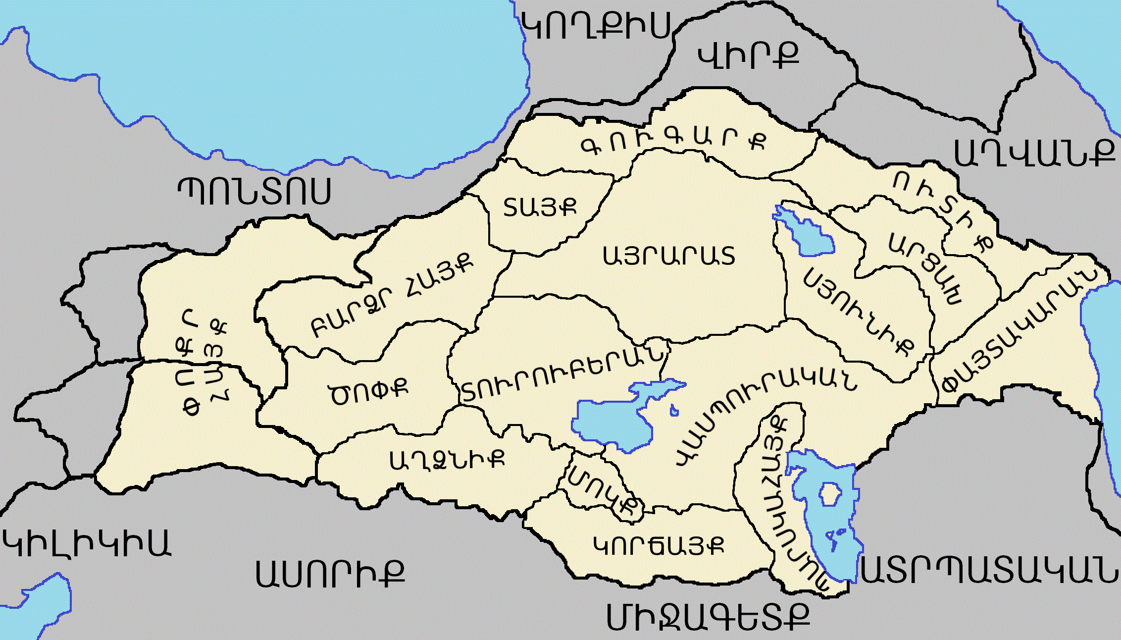 Մեծ Հայք (Հայերեն)